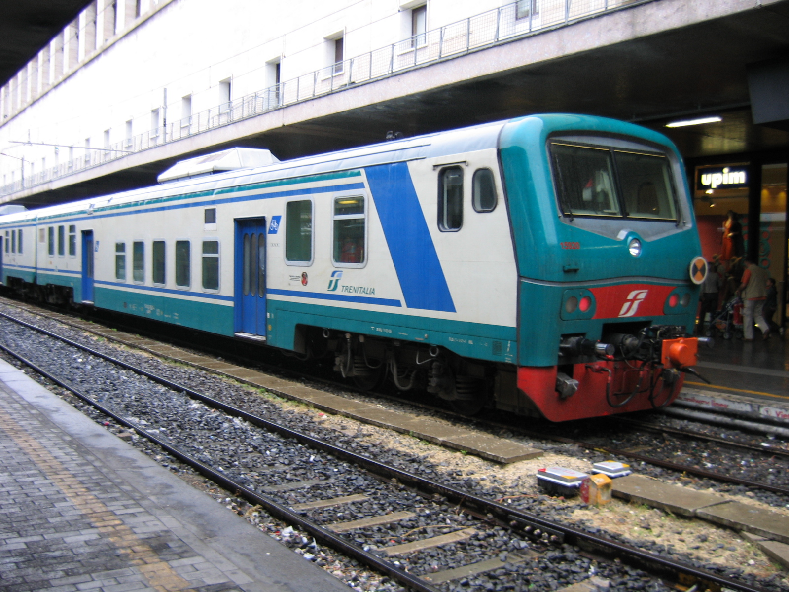 Carrozza a piano ribassato delle FS, versione pilota con cabina ricostruita